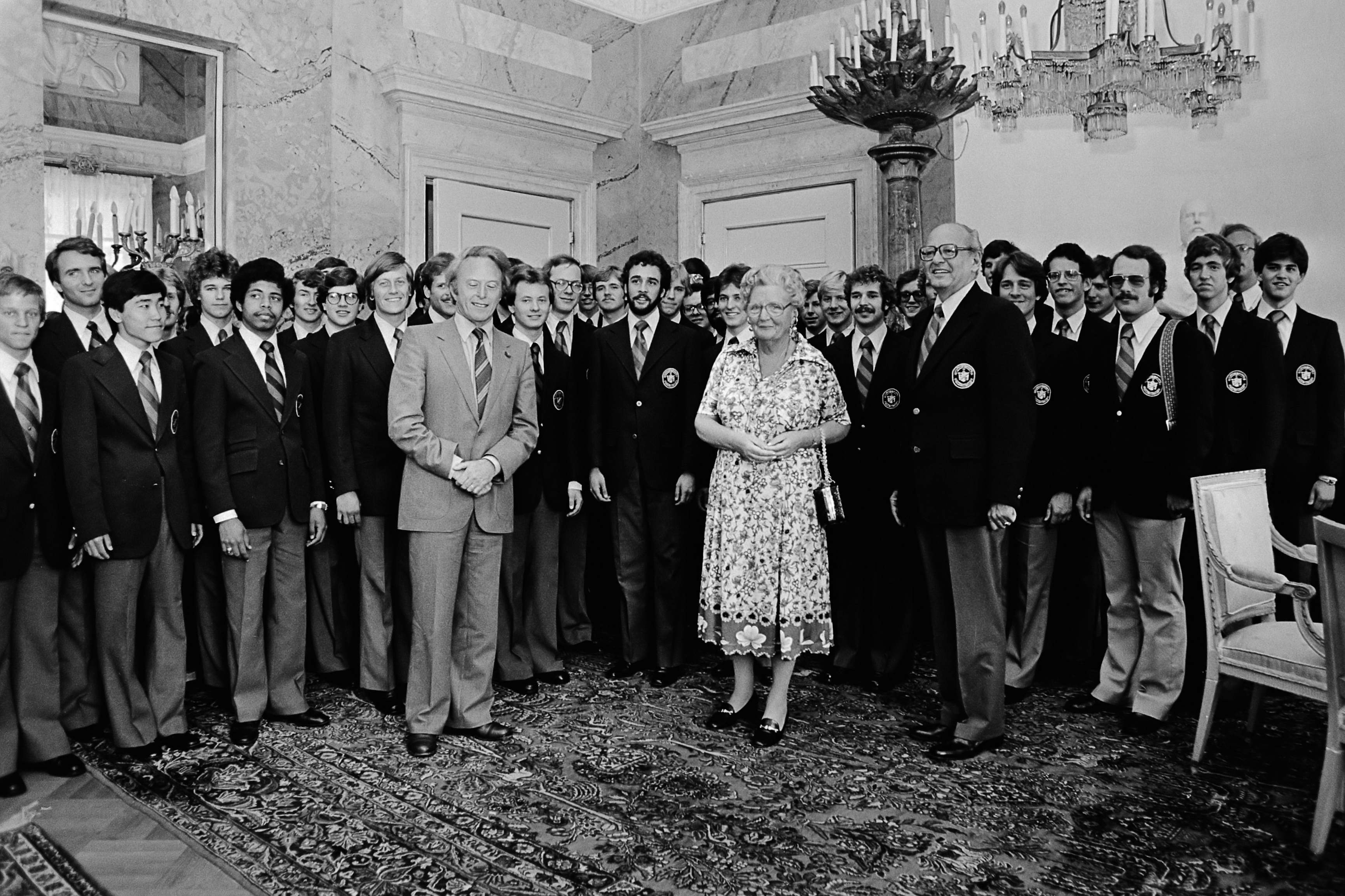 "Mans Glee Club" universiteitskoor uit Wheaton (V.S.) brengt Koningin Juliana een aubade op Paleis Soestdijk 28 juni 1979